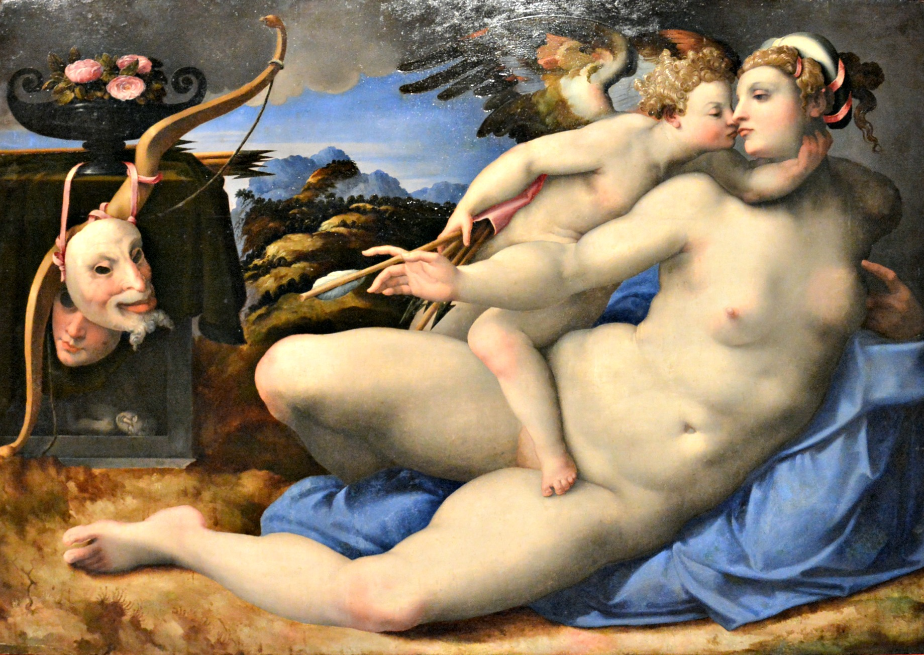 Vedi titolo